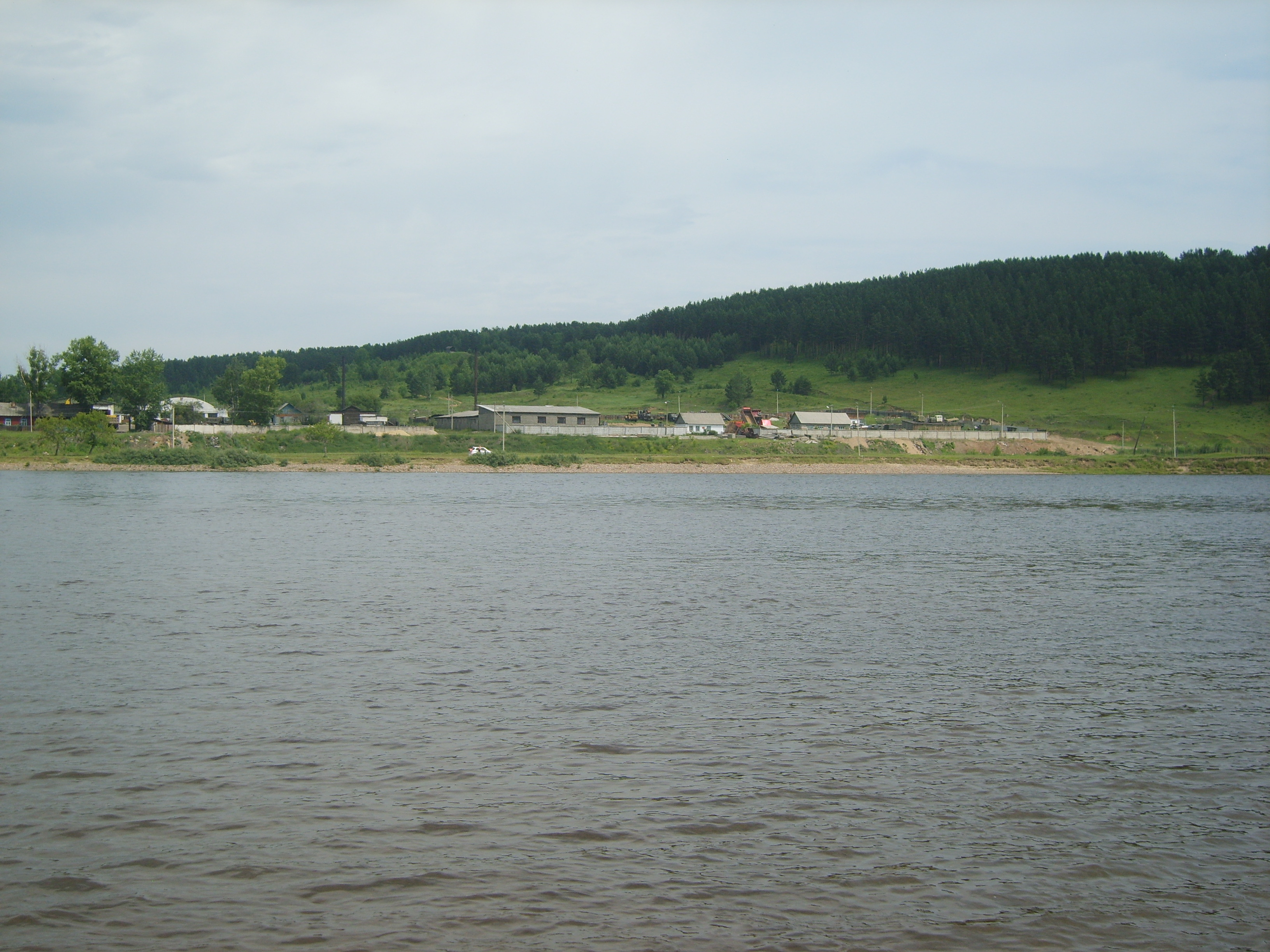 Уда